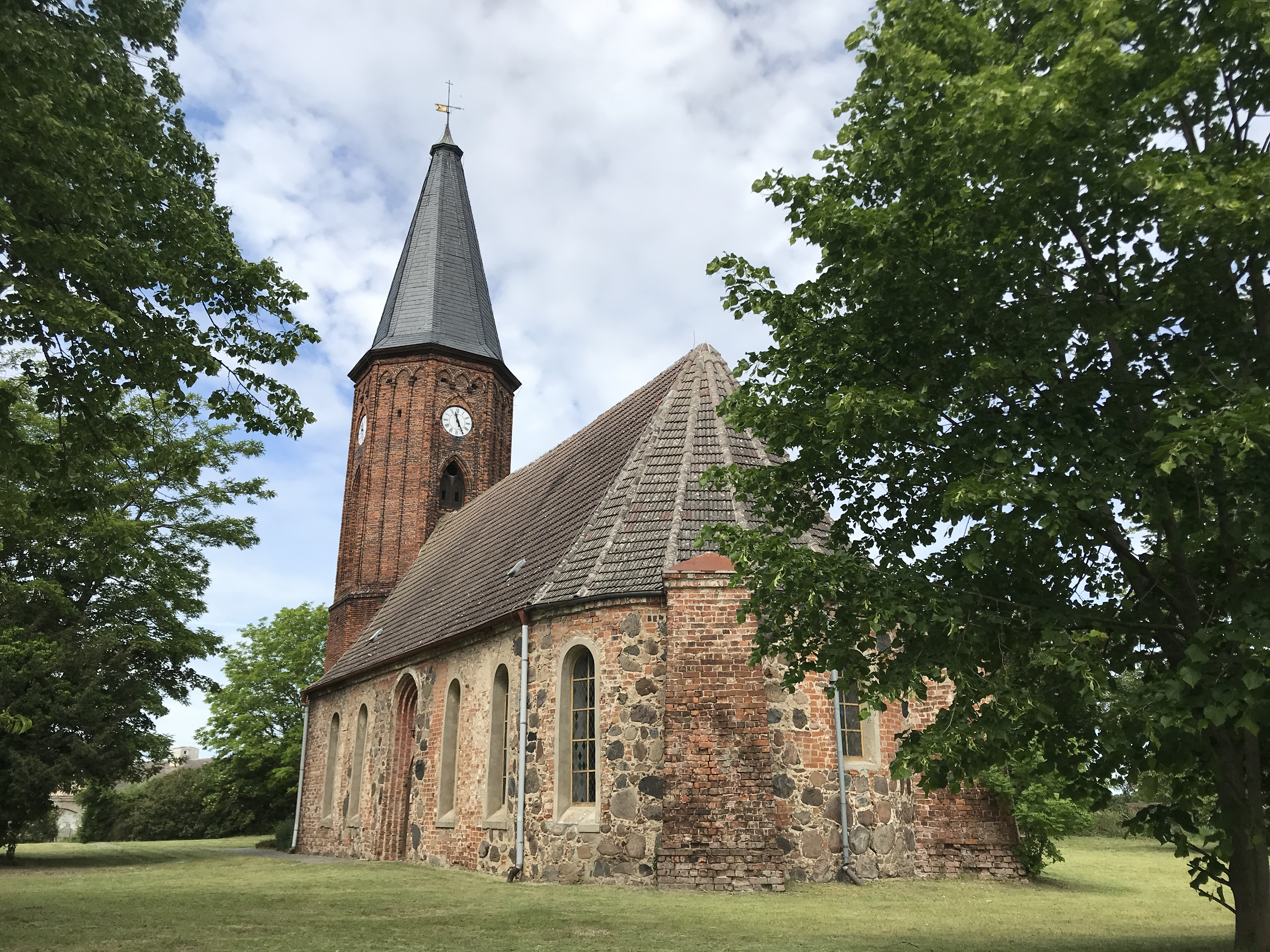 Die Dorfkirche Wachow ist eine im Kern spätgotische Saalkirche in Wachow, einem Ortsteil der Stadt Nauen im Landkreis Havelland in Brandenburg. Im Innern steht unter anderem ein Kanzelaltar aus der Zeit um 1730.